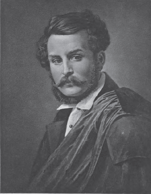 Carl Wilhelm Böttiger (1807–1878).